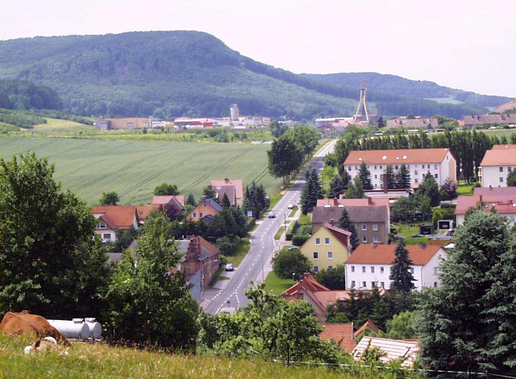 Bischofferode im Eichsfeld - Blick vom Hühnerberg über den östlichen Ortsrand zum Kalischacht und der Th.-Müntzer-Siedlung (im Hintergrund die Sonder und dahinter der Schwarzenberg) Veröffentlichung durch Wikipedia genehmigt - Archiv Heise - 21.06.2003